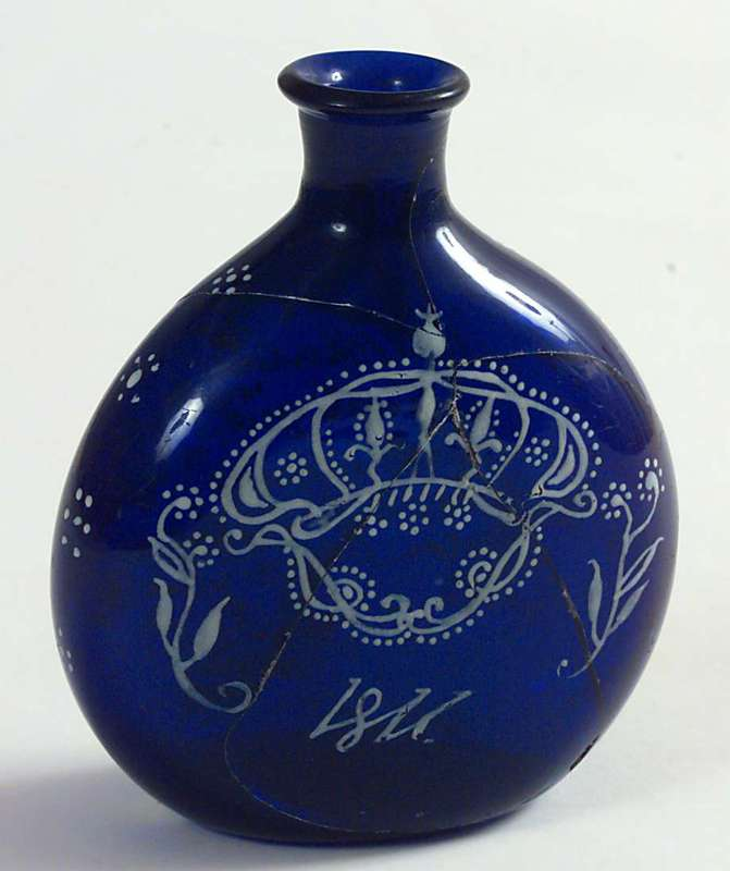 Lommelerke fra Gjøvigs Glassverk i blått glass med gravert dekor og datering 1811. Høyde 12 cm. Foto Anne-Lise Reinsfelt/Norsk Folkemuseum, NF.1919-0164